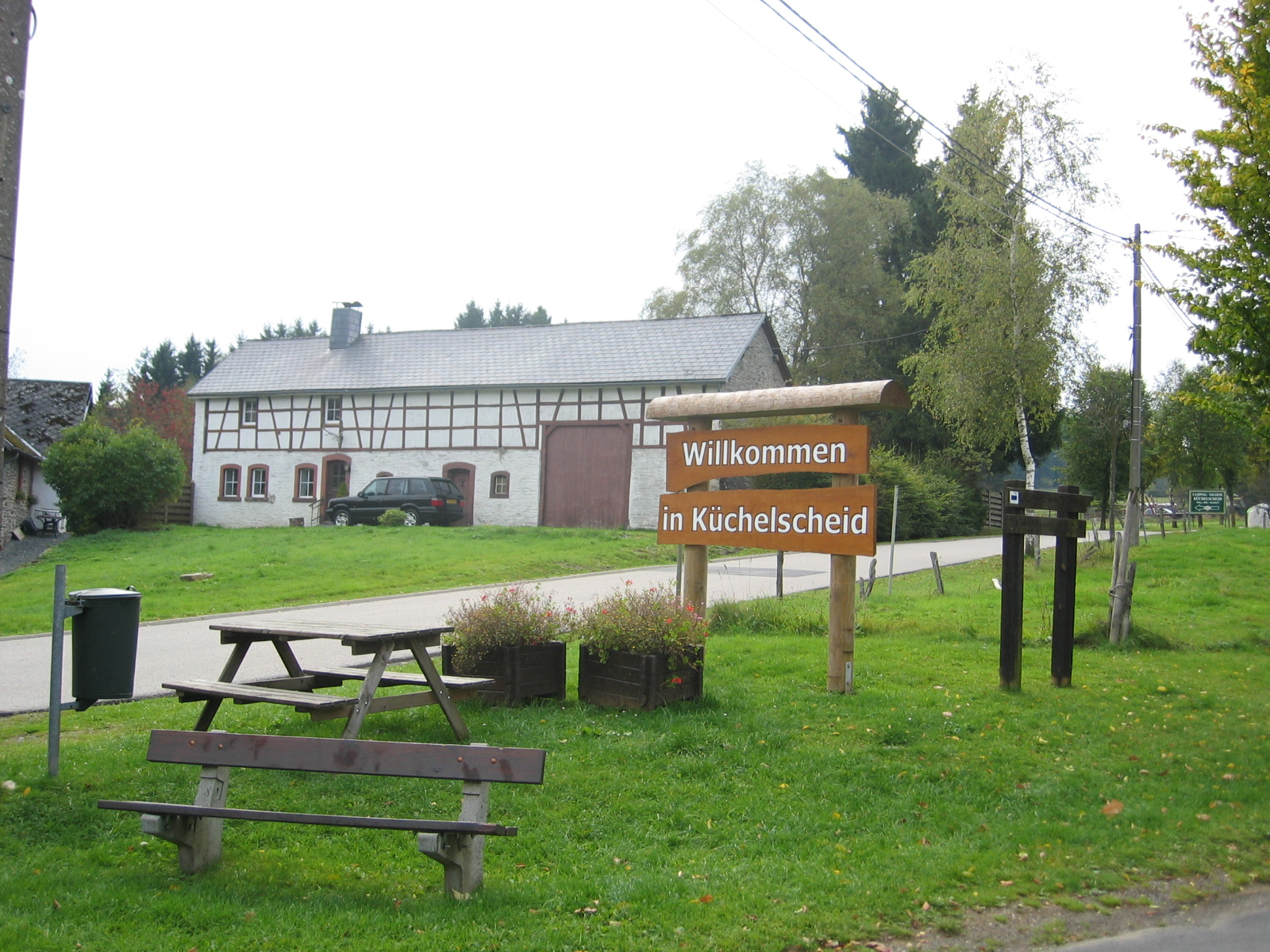 Willkommen in küchelscheid